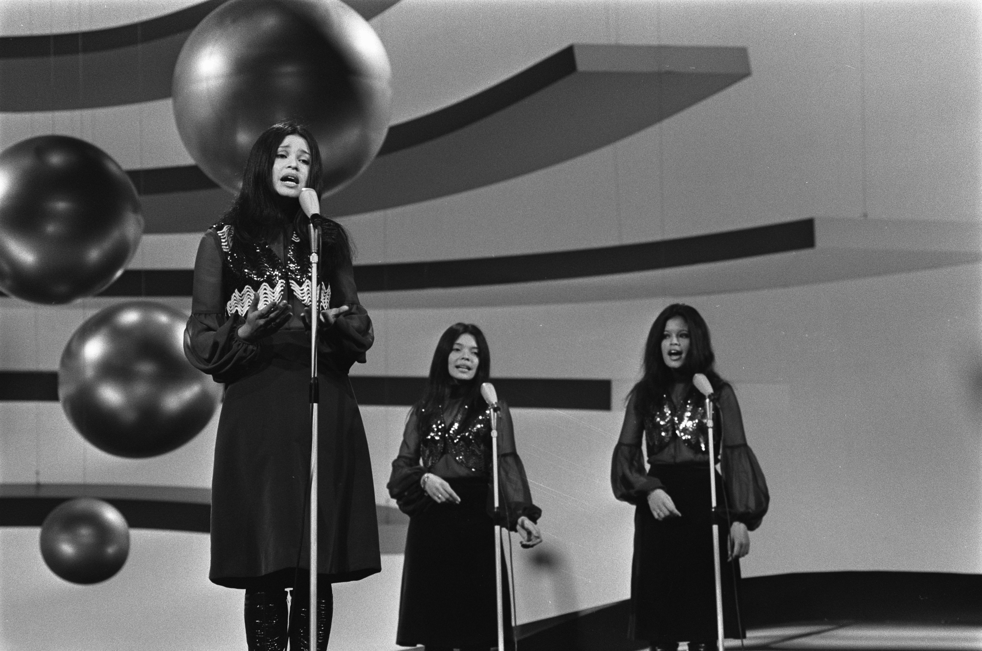 Collectie / Archief : Fotocollectie Anefo Reportage / Serie : Eurovisie Songfestival 1970 in RAI te Amsterdam Beschrijving : The Hearts of Soul (Nederland) Datum : 21 maart 1970 Locatie : Amsterdam, Noord-Holland Trefwoorden : artiesten, songfestivals, zangers Instellingsnaam : Eurovisie Song Festival Fotograaf : Koch, Eric / Anefo Auteursrechthebbende : Nationaal Archief Materiaalsoort : Negatief (zwart/wit) Nummer archiefinventaris : bekijk toegang 2.24.01.05 Bestanddeelnummer : 923-3706